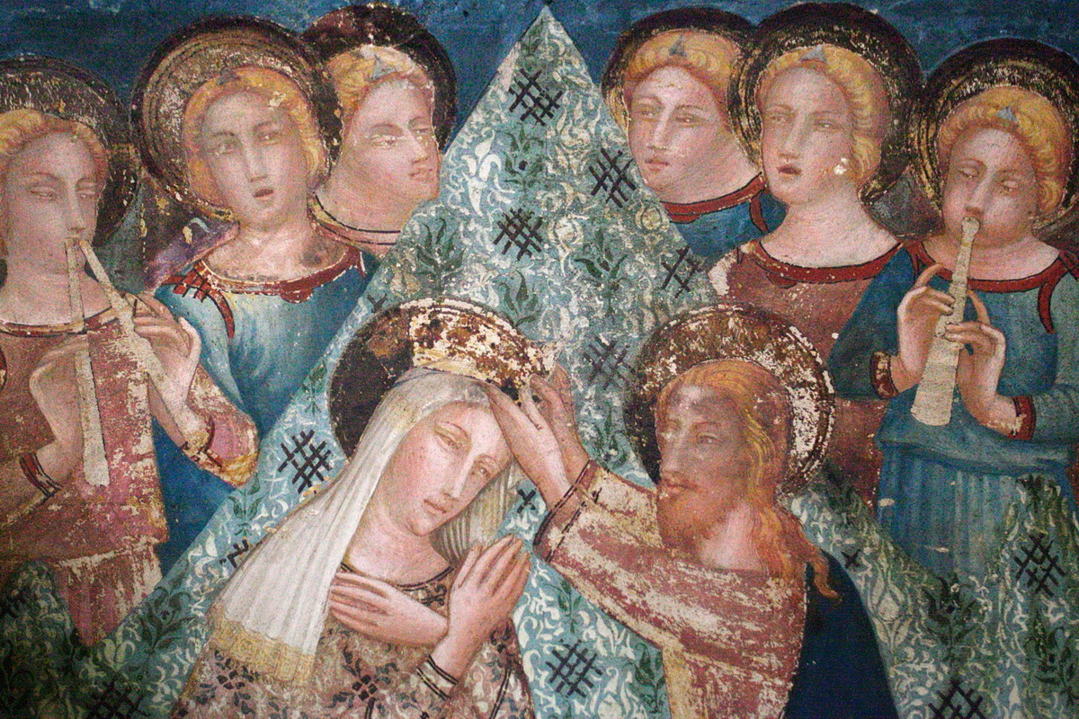 Coronació de la Mare de Déu (detall dels personatges)